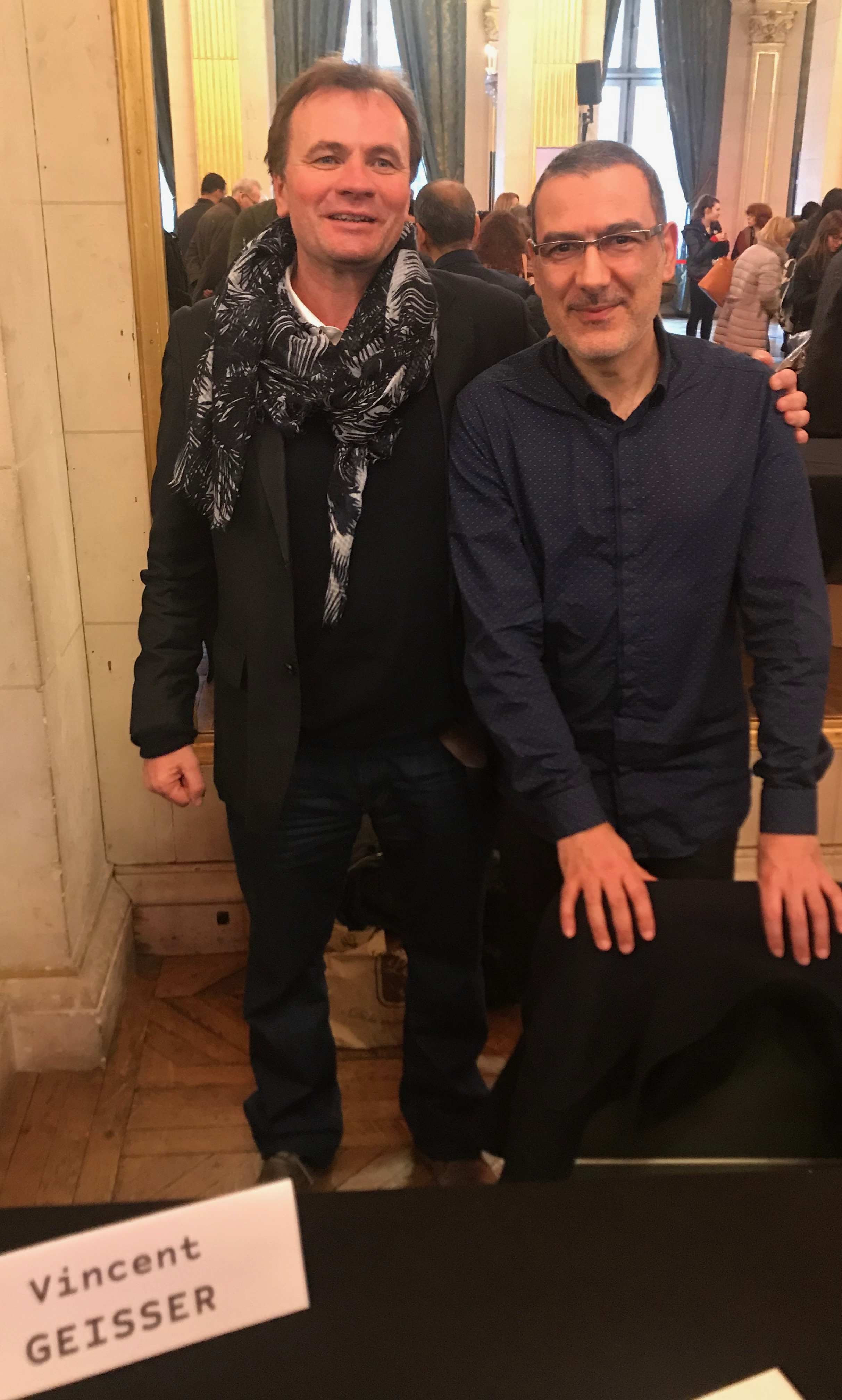 Vincent Geisser (portant une écharpe à gauche) et Omero Marongiu-Perria (à droite), Maghreb-Orient des Livres, Paris, février 2018.